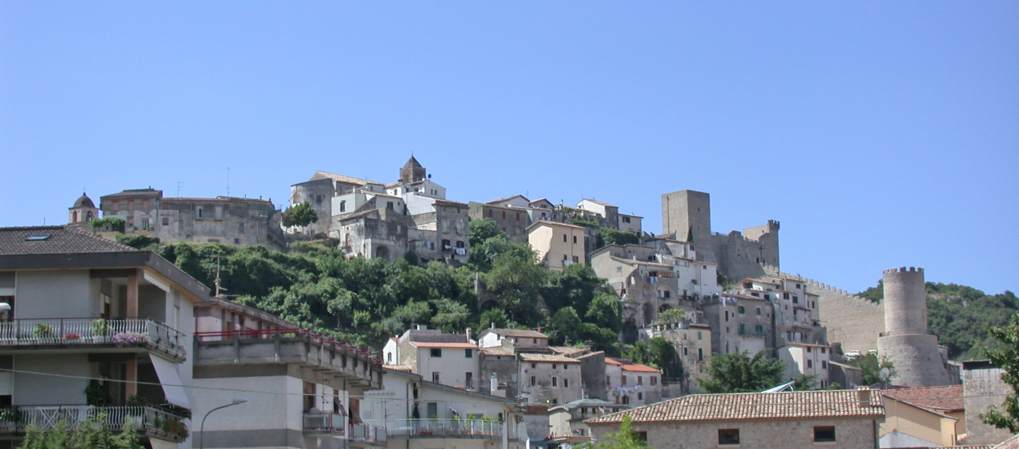 Itri, provincia di Latina, regione Lazio, Italia. Città alta, panorama con il Castello, dalla parte bassa della città